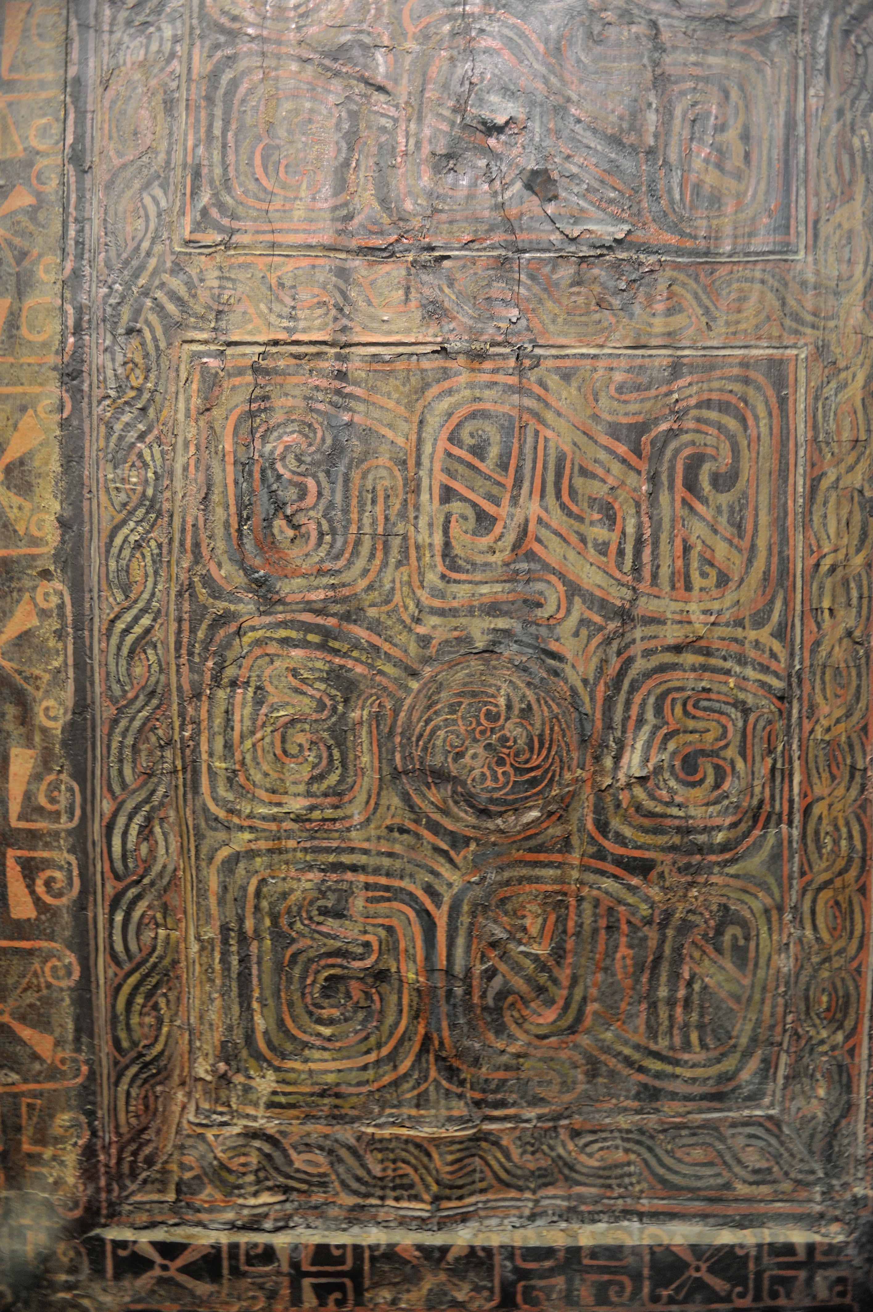 曾侯乙墓外棺，湖北省博物馆